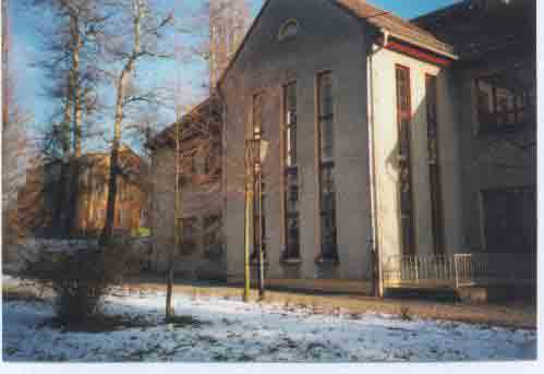 Grundschule Lossa im Winter in der Vorderansicht